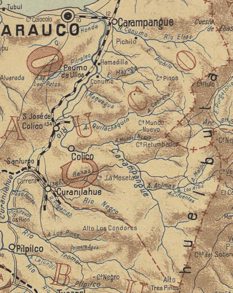 Cuenca del río Carampangue.